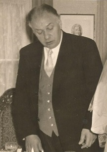 Domorganist Prof. Hans Bachem Köln 1956